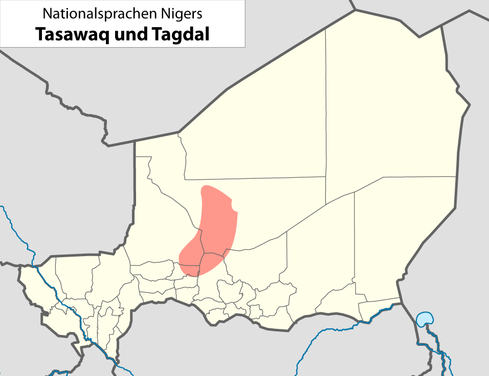 Nationalsprachen des NigerDie dargestellte Nationalsprache kann dem Dateinamen entnommen werden.